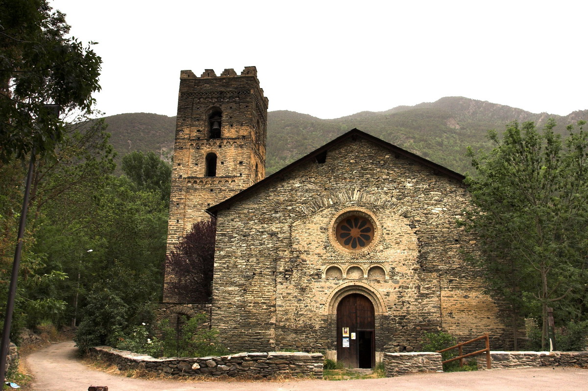 Església de Santa Maria de la Ribera de Cardós (la Vall de Cardós, Pallars Sobirà, Catalonia, Spain) Romànic / Románico / Romanesque s.XII. Modificada al s.XVIII